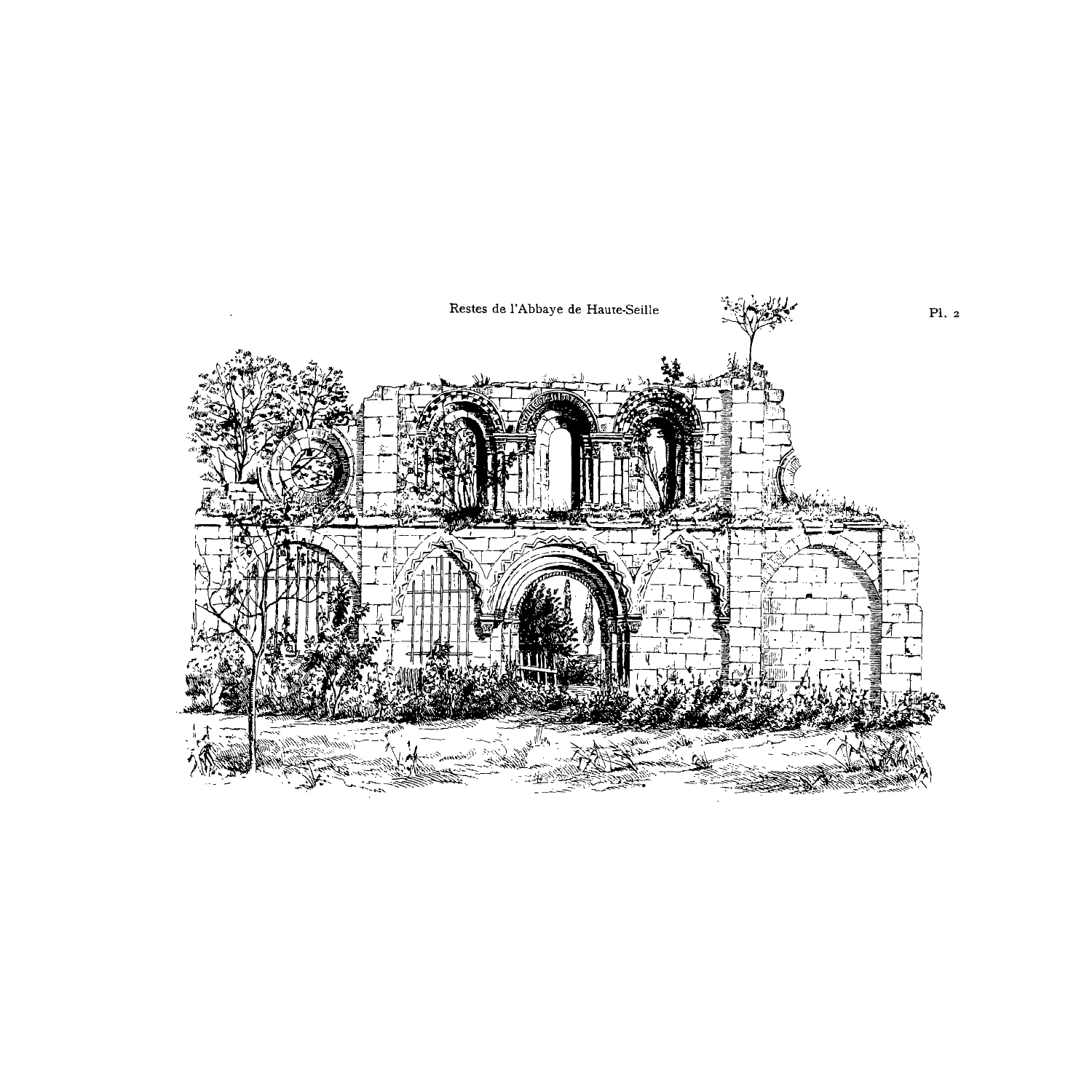 abbaye cistercienne haute-seille meurthe-et-moselle